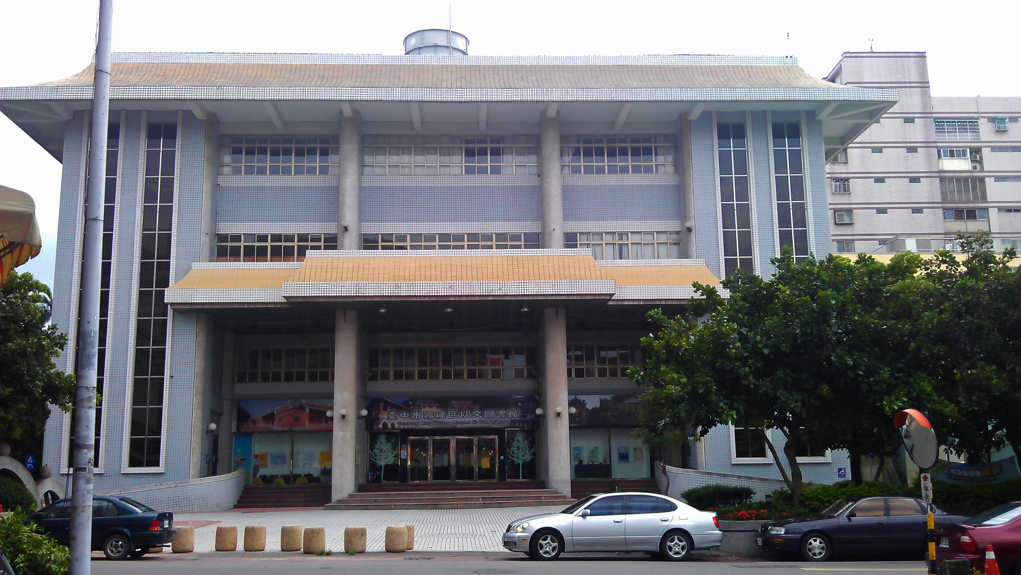 中文（台灣）: 臺中市霧峰區以文圖書館。